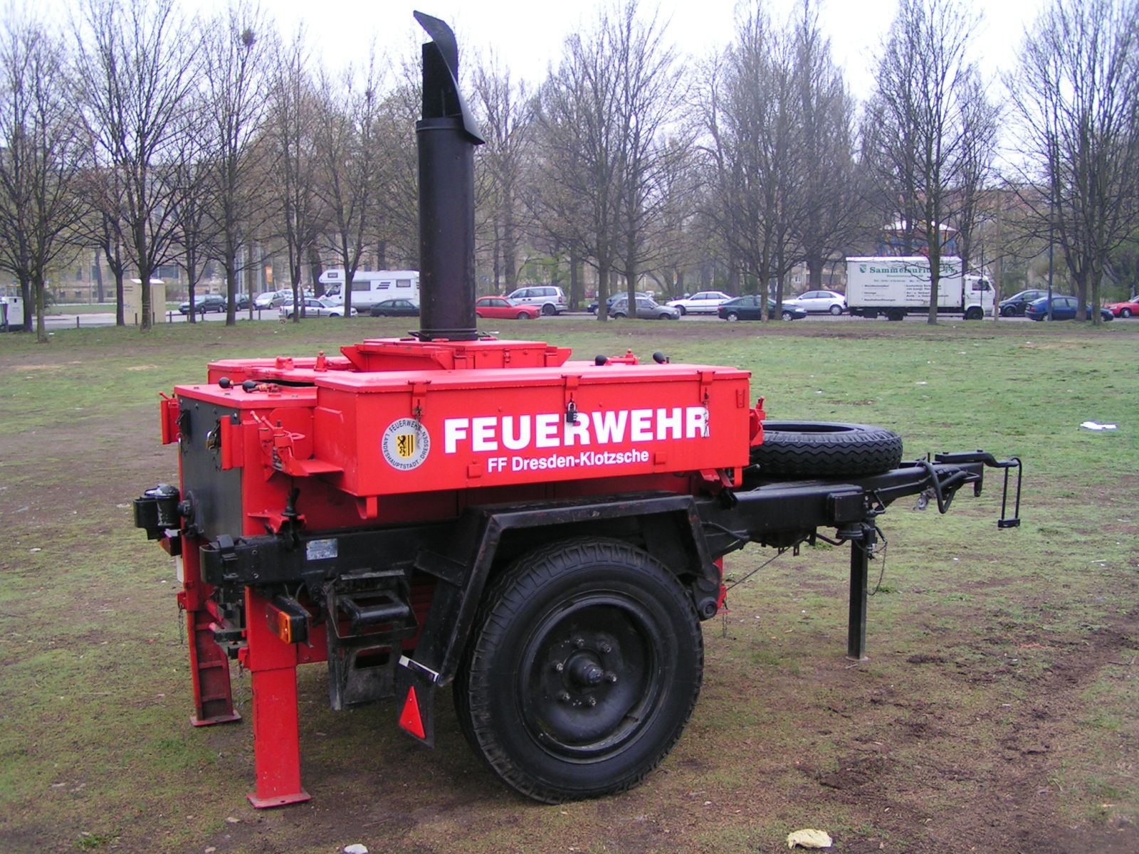 Gulaschkanone Typ: FKÜ 180/72M Baujahr:1985 aus ehemaligem NVA Bestand heute Freiwillige Feuerwehr Dresden Klotzsche selbstfotografiert GNU-FDL